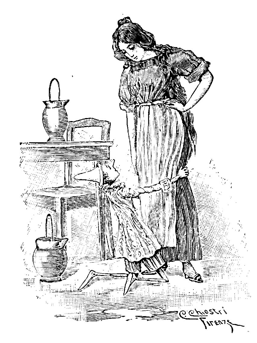 Illustrations from "Le avventure di Pinocchio, storia di un burattino", Carlo Collodi, Bemporad & figlio, Firenze 1902 (Drawings and engravings by Carlo Chiostri, and A. Bongini)